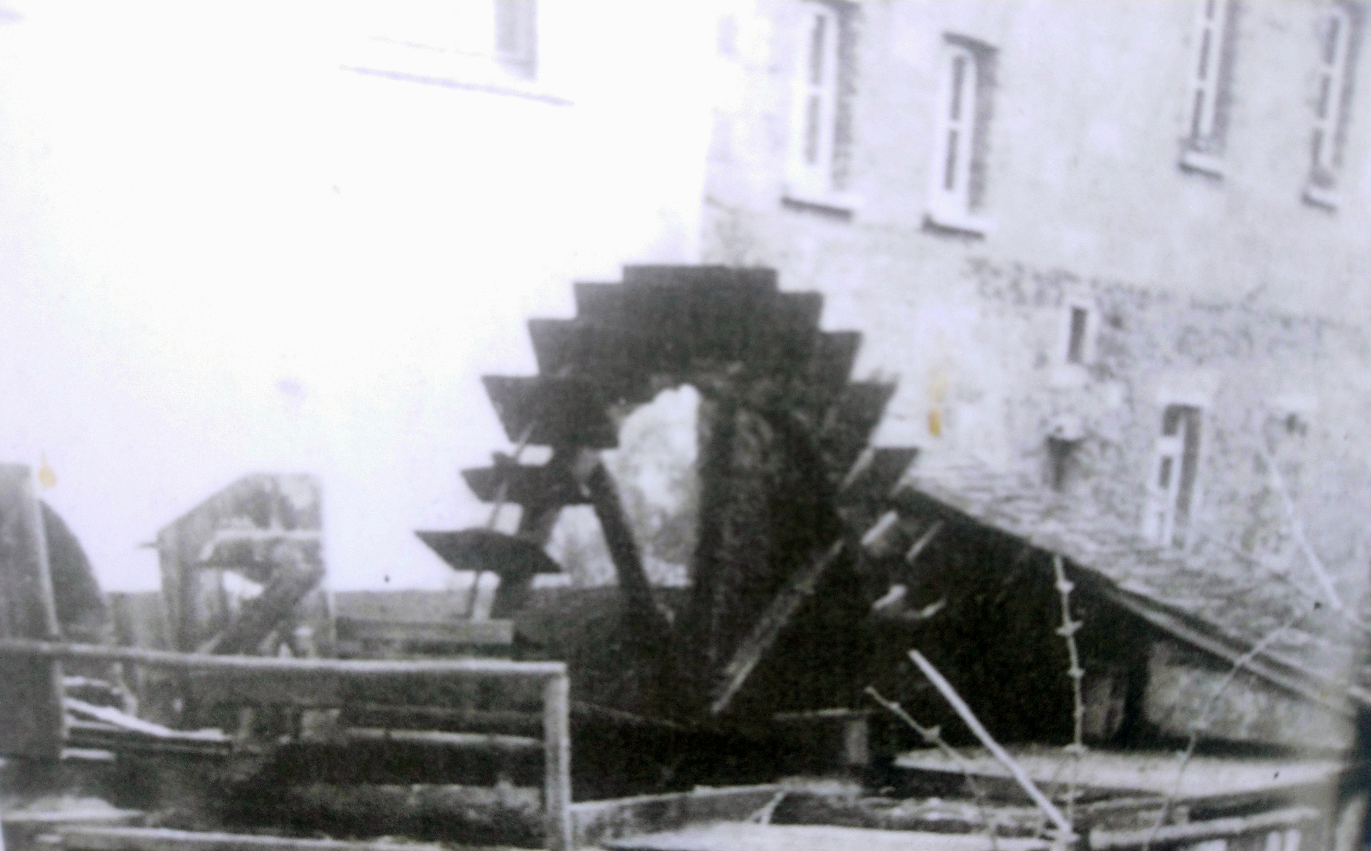 Die Schäfereimühle in Kahl am Main